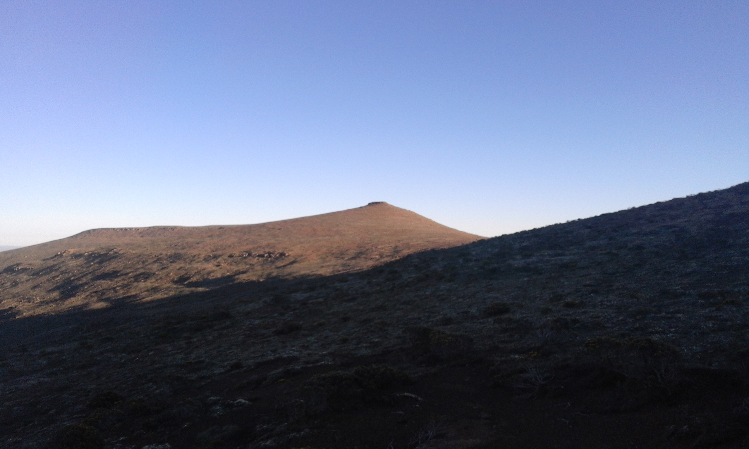 Blick auf den Gipfel aus südlicher Richtung